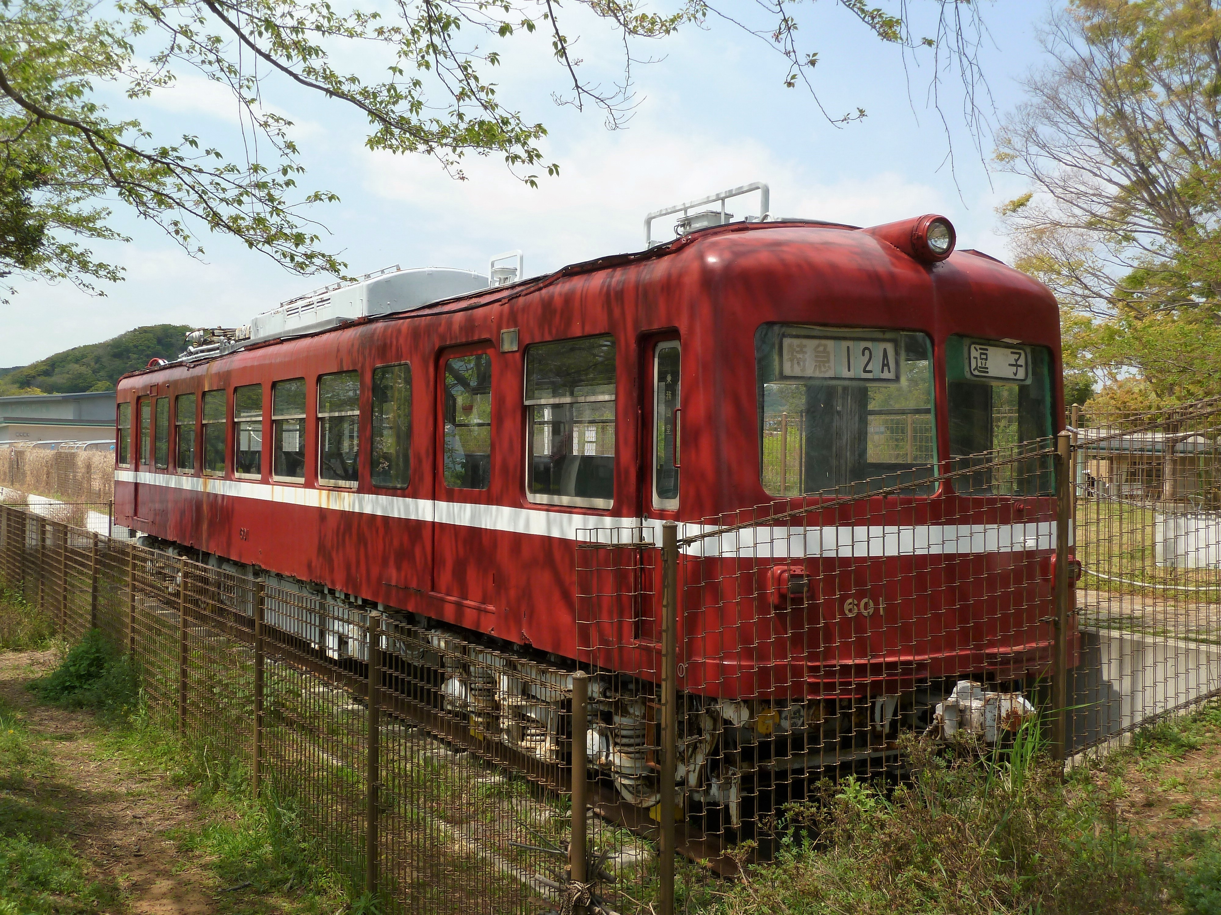 第一運動公園内に静態保存されている京急旧600系デハ601(神奈川県逗子市)